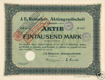 Reinecker AG Chemnitz, 1000-Mark Aktie vom 1. Juli 1911